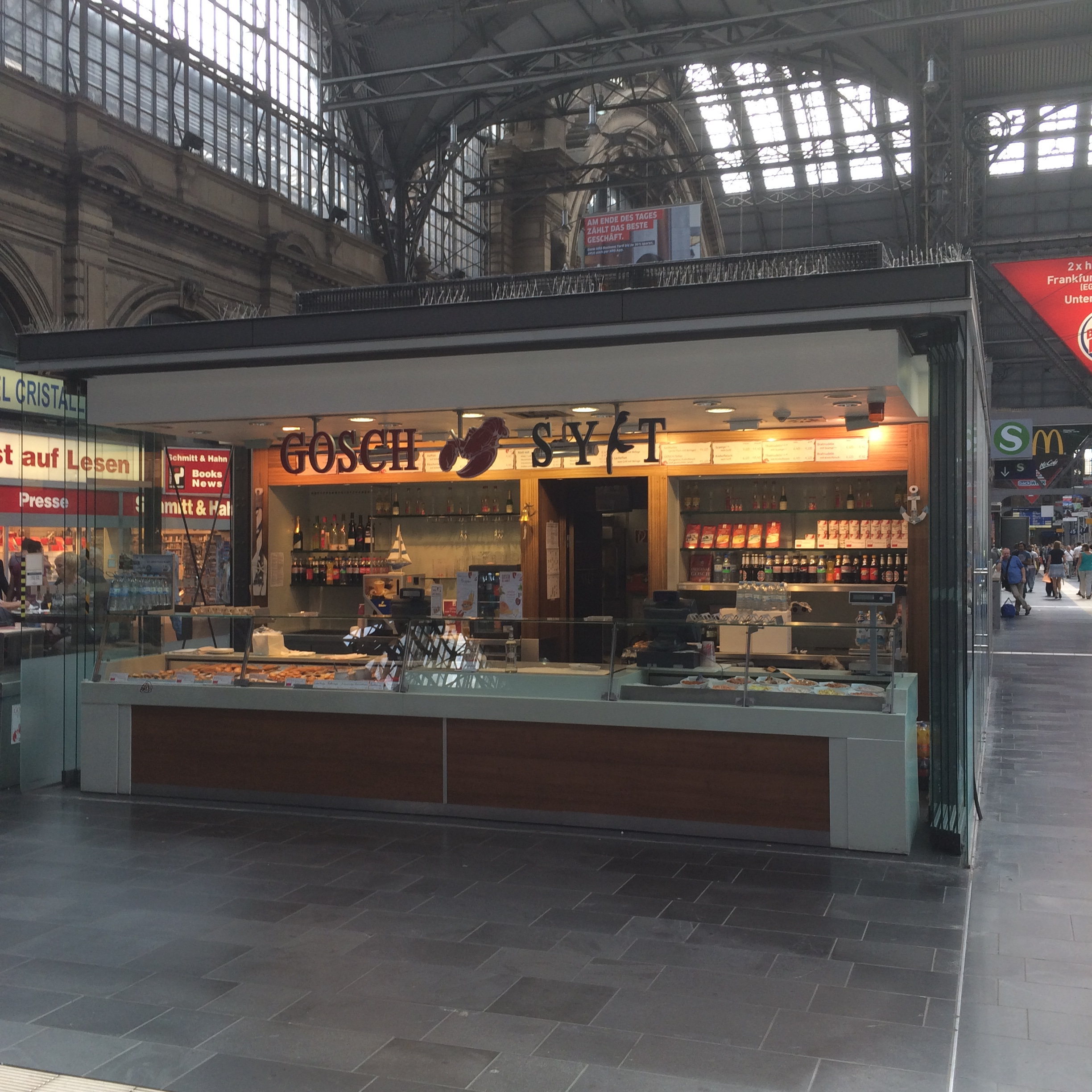 Gosch Shop